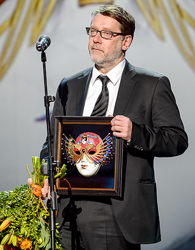 Фестиваль «Золотая маска» 2015 года